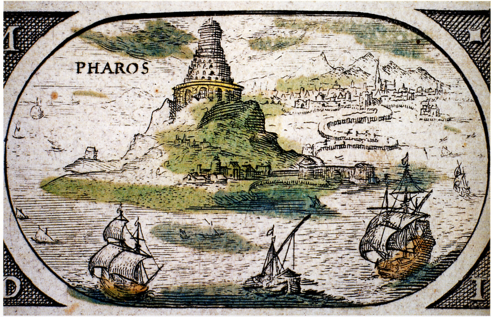 Phare d'Alexandrie, Atlas de Jansson Jansonius